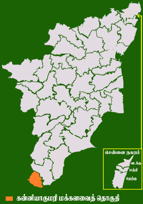 தமிழக வரைபடத்தில் உள்ள கன்னியாகுமாரி மக்களவைத் தொகுதி